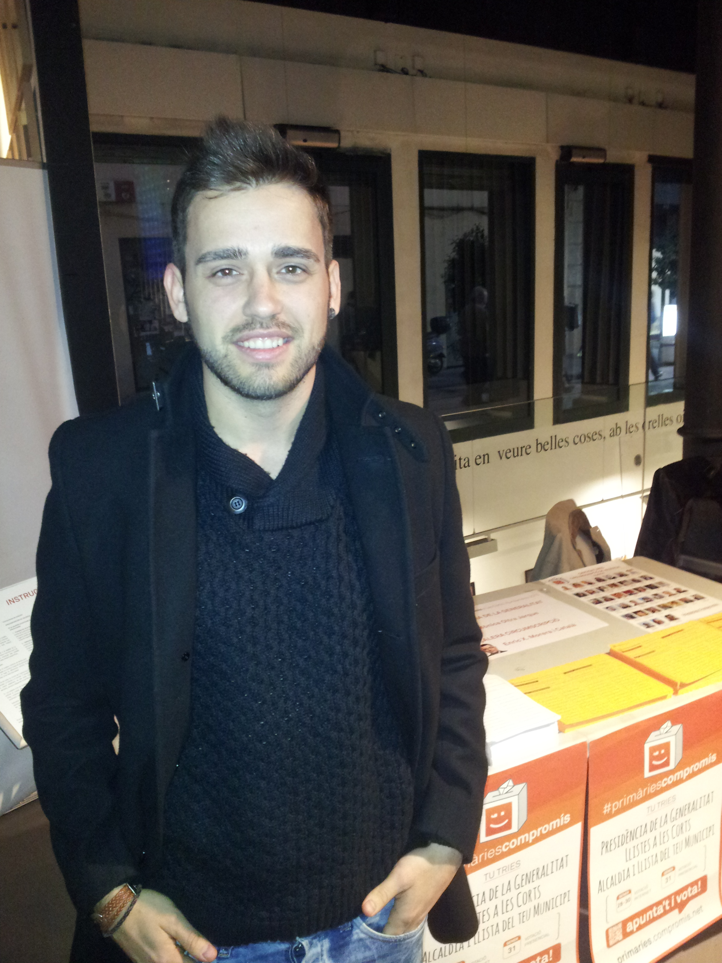 Fran Ferri a les primàries de Compromís, on va ser el candidat més votat per a llista de les Corts Valencianes a les Comarques de València.